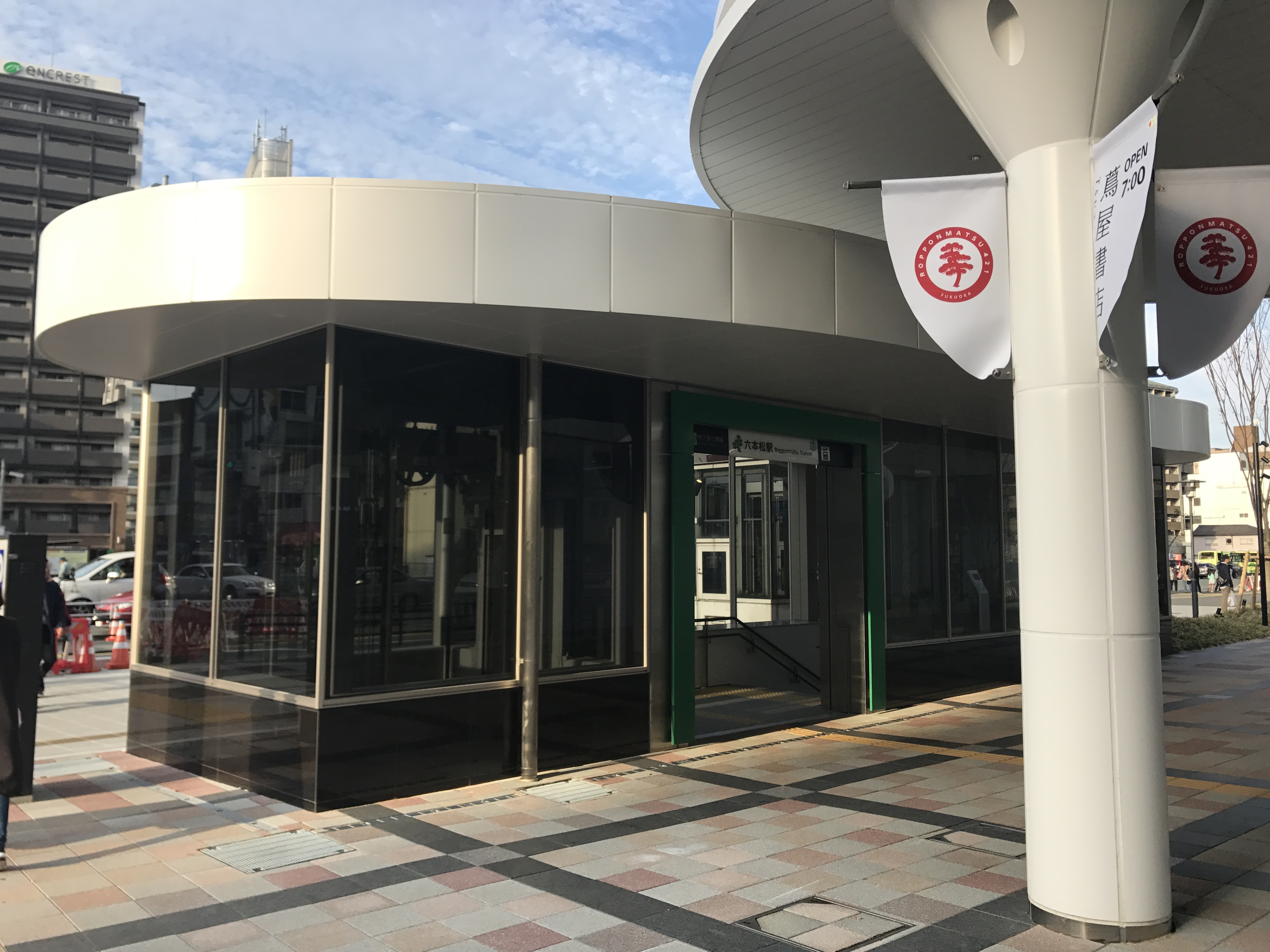 六本松駅の3番出入り口